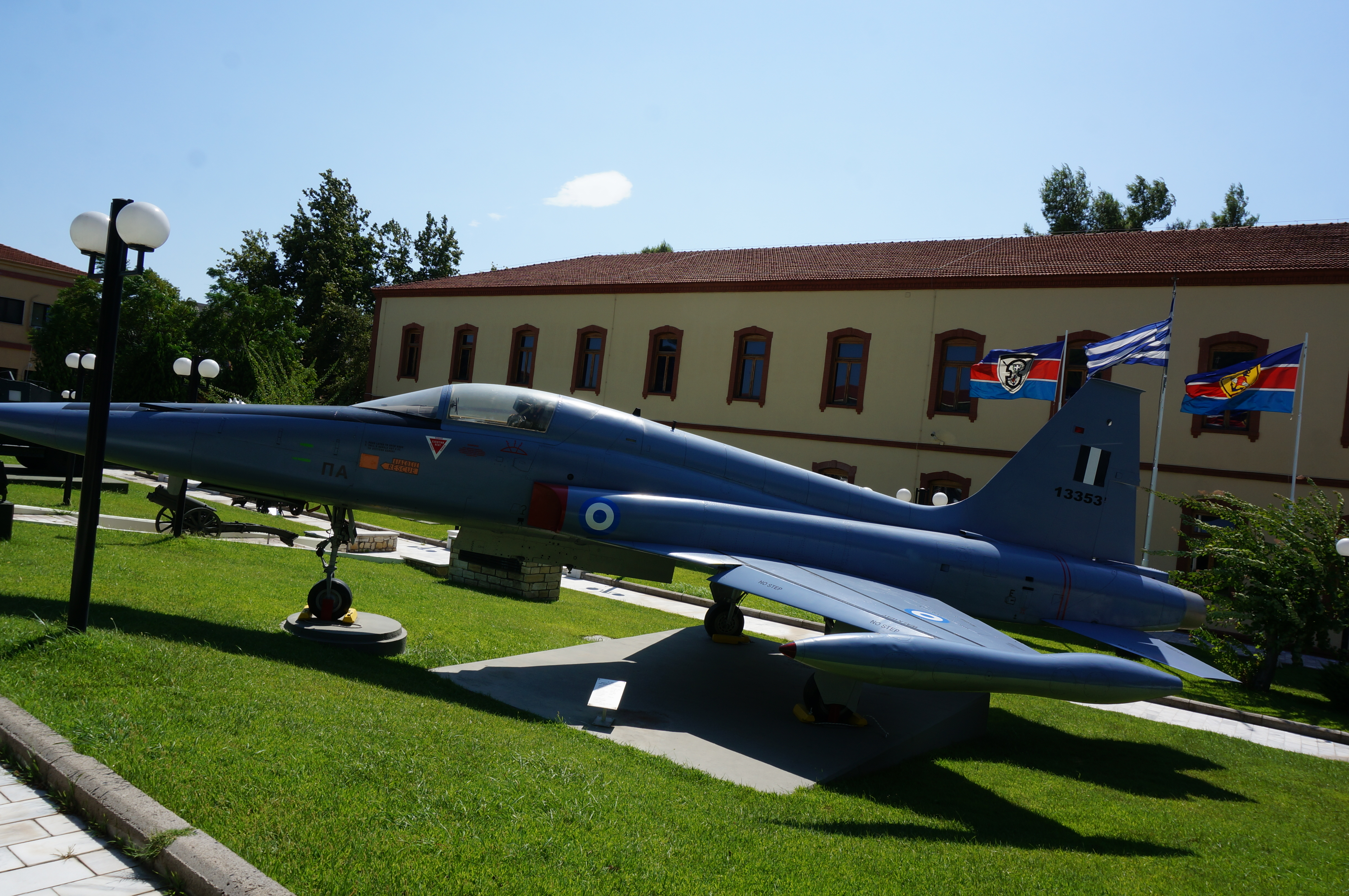 présenté au musée de la guerre.